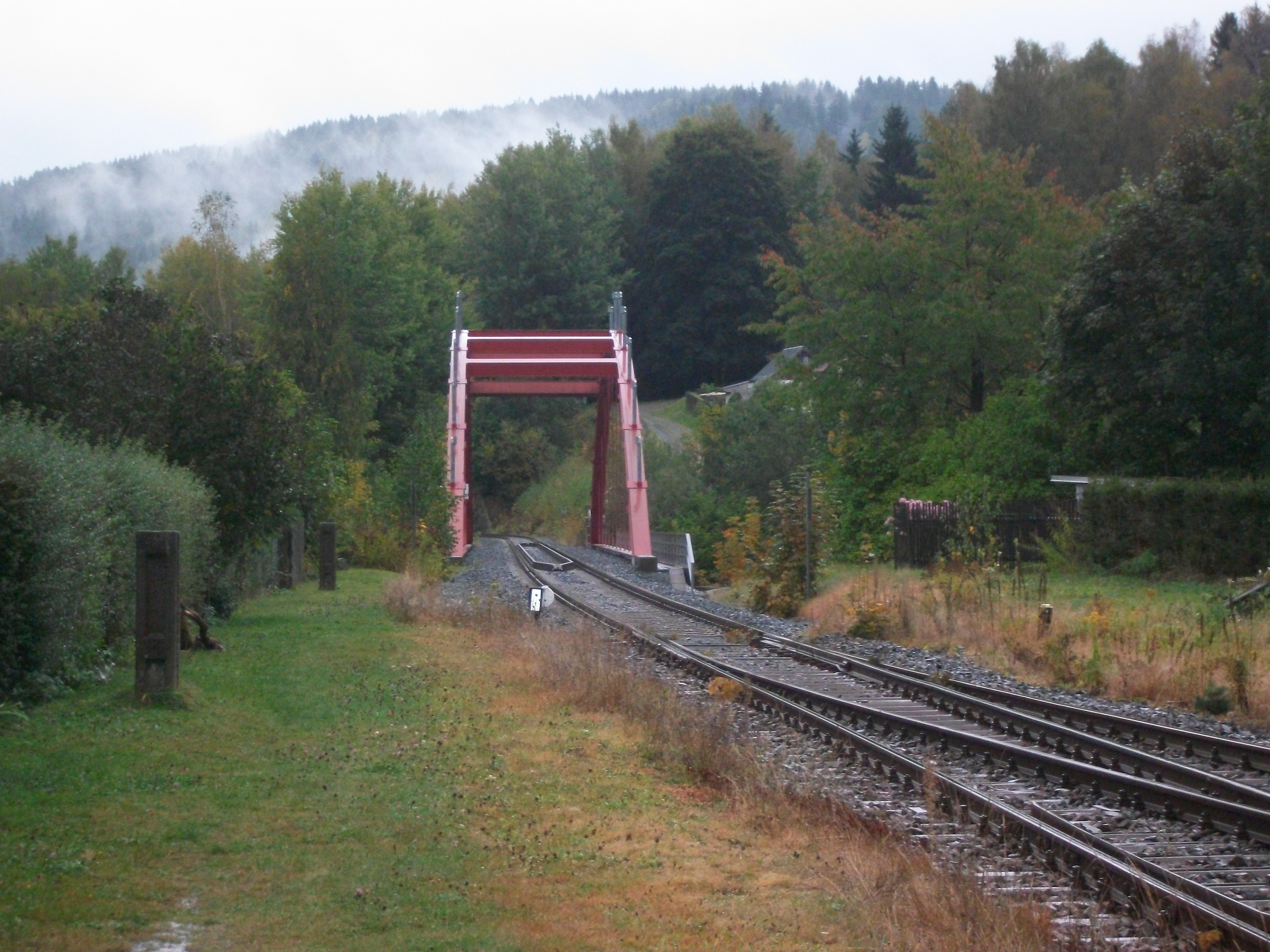 Klingenthal, Eisenbahnbrücke nach Kraslice (Graslitz) (2016)